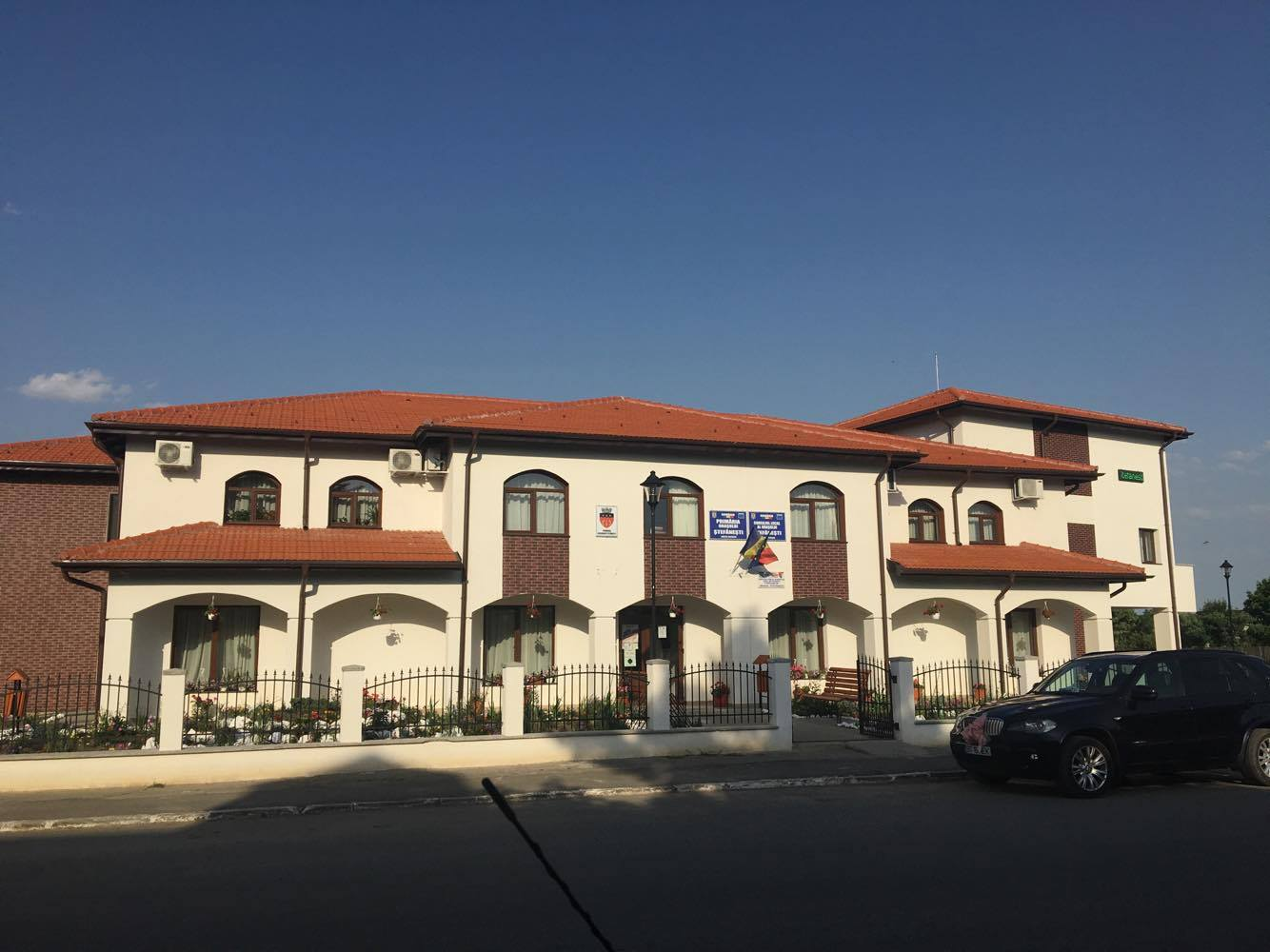 Primăria oraşului Ştefăneşti, BT